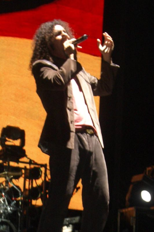 Serj Tankian on stage